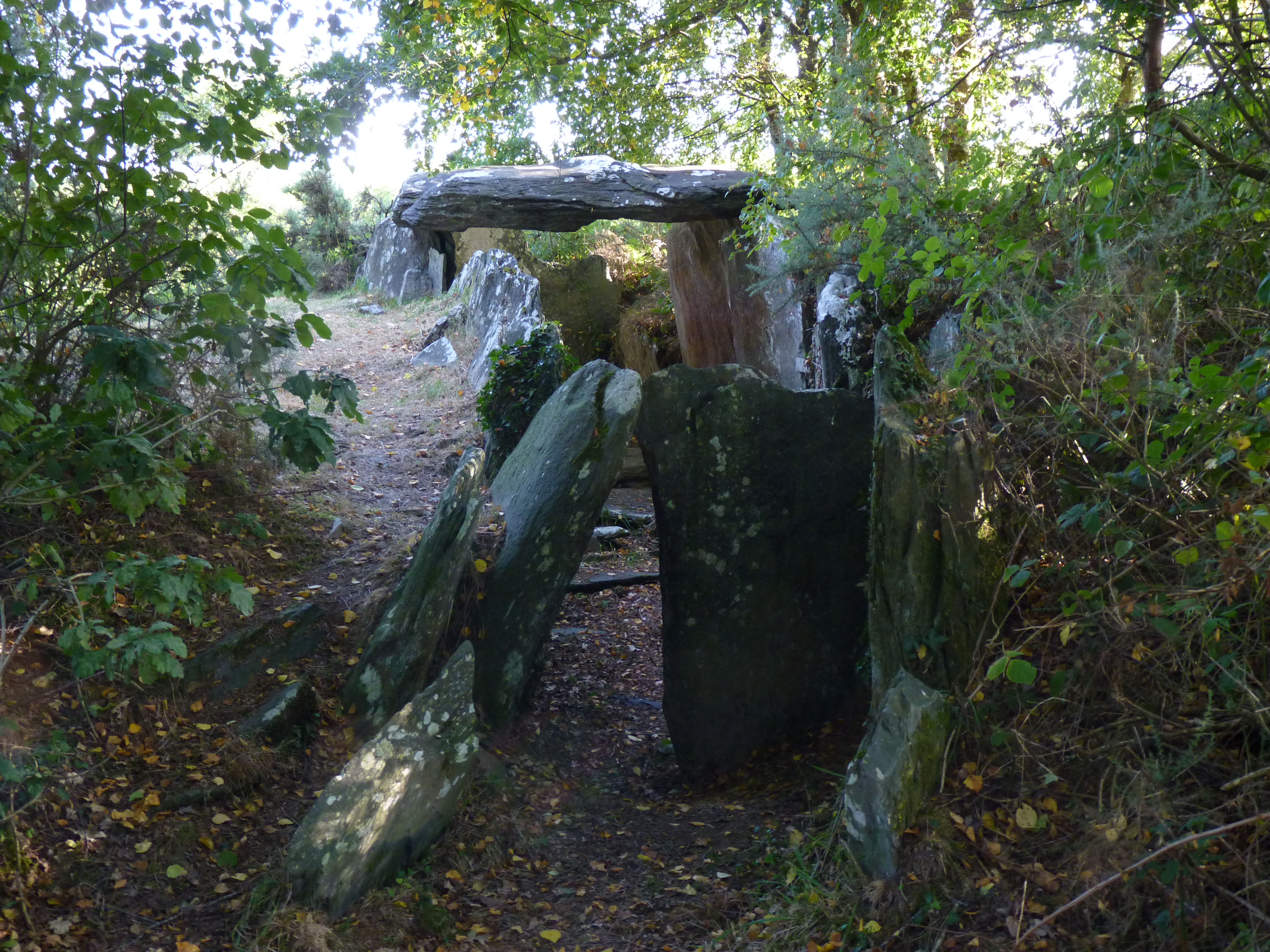 Allée couverte de Liscuis II